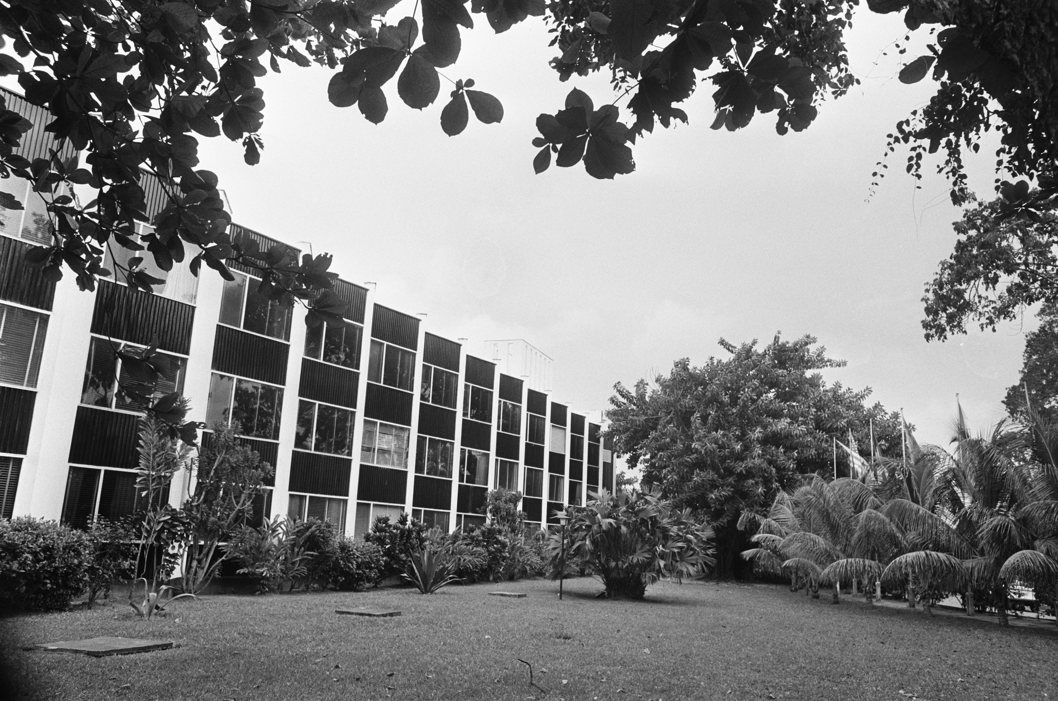 Collectie / Archief : Fotocollectie Anefo Reportage / Serie : [ onbekend ] Beschrijving : Suriname, straatbeelden in Paramaribo; duurste hotel Torarica, politieagente in straat Datum : 1 april 1975 Trefwoorden : POLITIEAGENTEN, STRAATBEELDEN, hotels Fotograaf : Verhoeff, Bert / Anefo Auteursrechthebbende : Nationaal Archief Materiaalsoort : Negatief (zwart/wit) Nummer archiefinventaris : bekijk toegang 2.24.01.05 Bestanddeelnummer : 927-8443